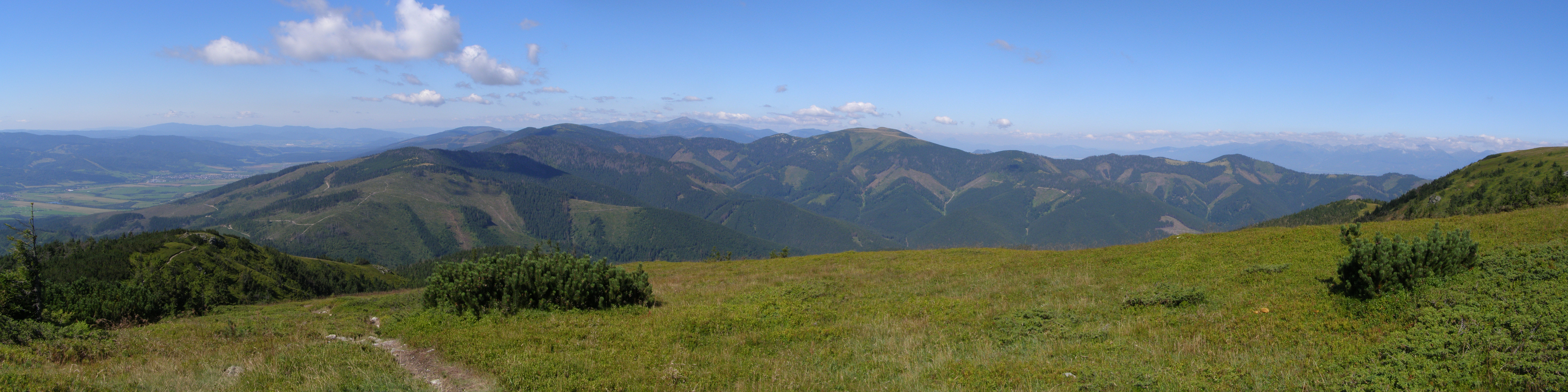 Nízké Tatry, Kráľovohoľské Tatry, pohled z vrcholu Veľká Vápenica (1691 m) na západ: zcela vlevo Horehronské podolie a za ním Slovenské rudohoří, vlevo vrchol Kolesárová (1508 m), za ní mírně napravo Oravcová (1544 m), Zadná hoľa (1602 m) a Homôľka (1660 m), uprostřed zcela vzadu Ďumbier (2043 m), na levé straně panoramatu masiv Veľký Bok (1727 m), zcela vzadu vlevo Vysoké Tatry